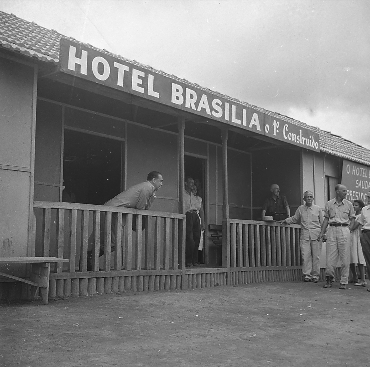 Imagem do Fundo Agência Nacional, do Arquivo Nacional